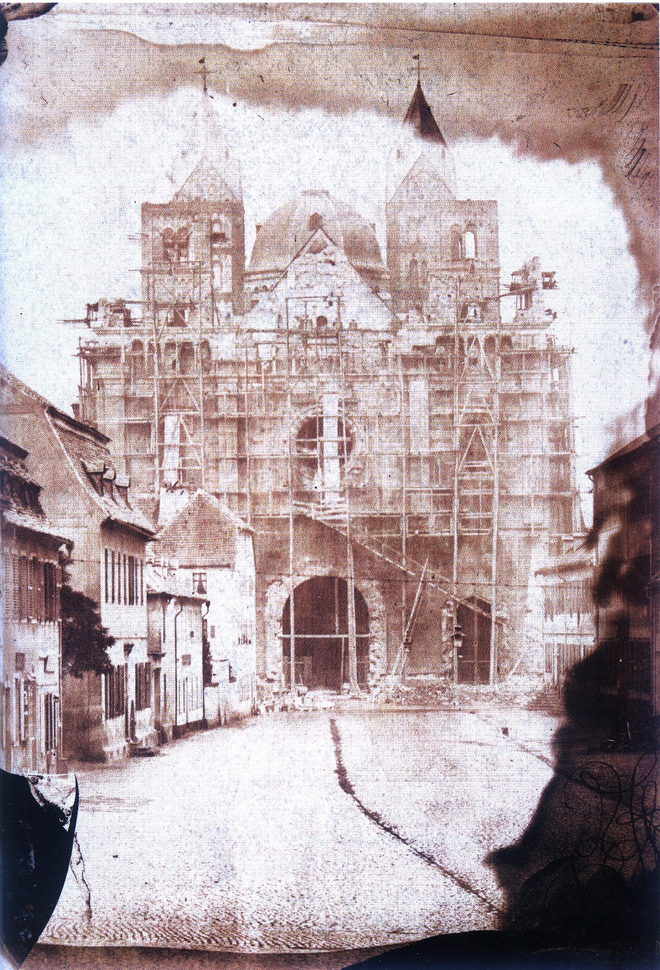 Speyer, Die Domfassade im Bau (1857), Albuminpapierkopie. Hist.Mus. der Pfalz Inv.Nr. C 1903/1131 a